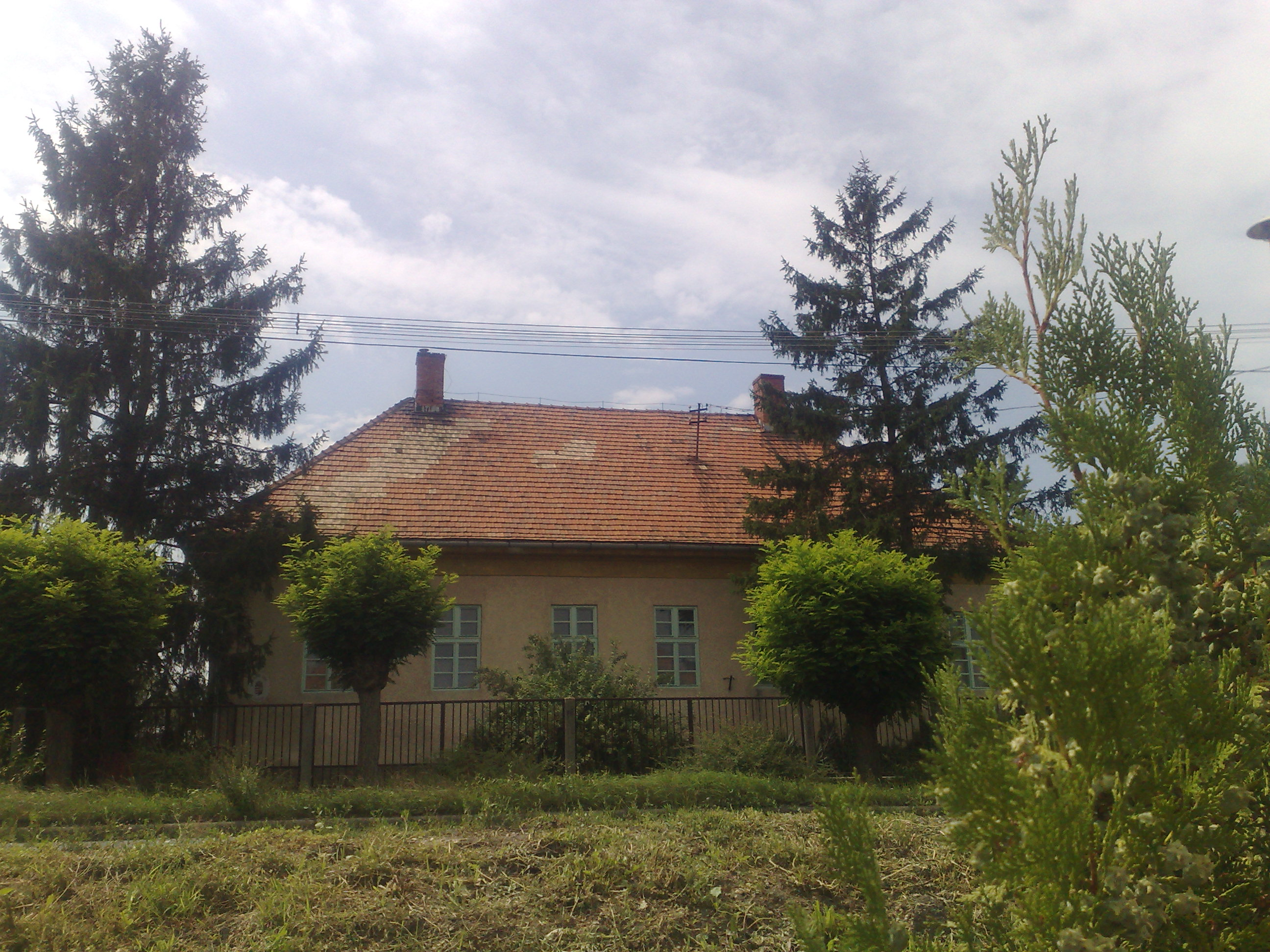 Szilsárkány - Hőgyész-kúria??. Az épületet valószínűleg lebontották, mert a helyén a Fő u. 16 alatt egyértelműen egy újabb lakóépület ('80 körüli) áll. Az itteni épület, nem igazán illik be a műemlékek sorába. muemlekem.hu